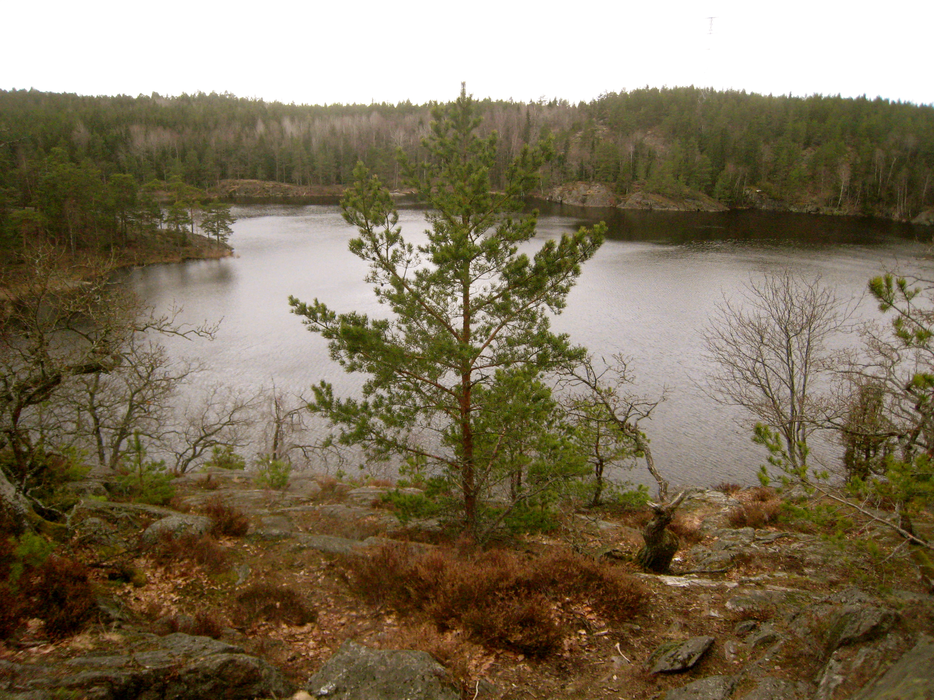 Ulvsjön